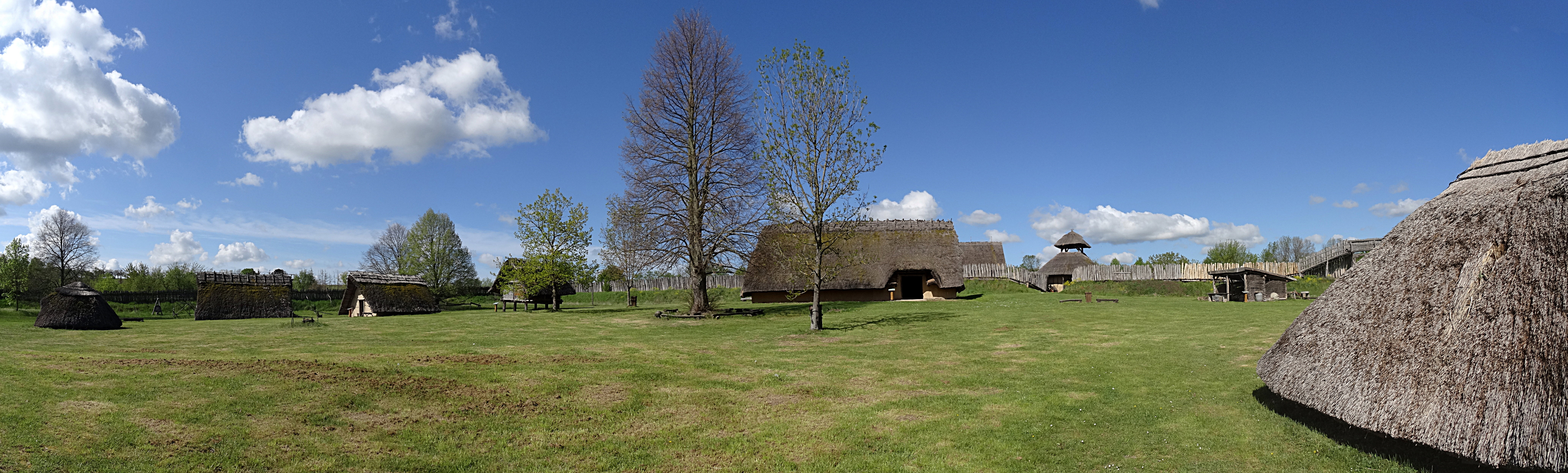 Panorama der rekonstruierten Hauptburg, Archäologisches Freilichtmuseum Funkenburg (Westgreußen)